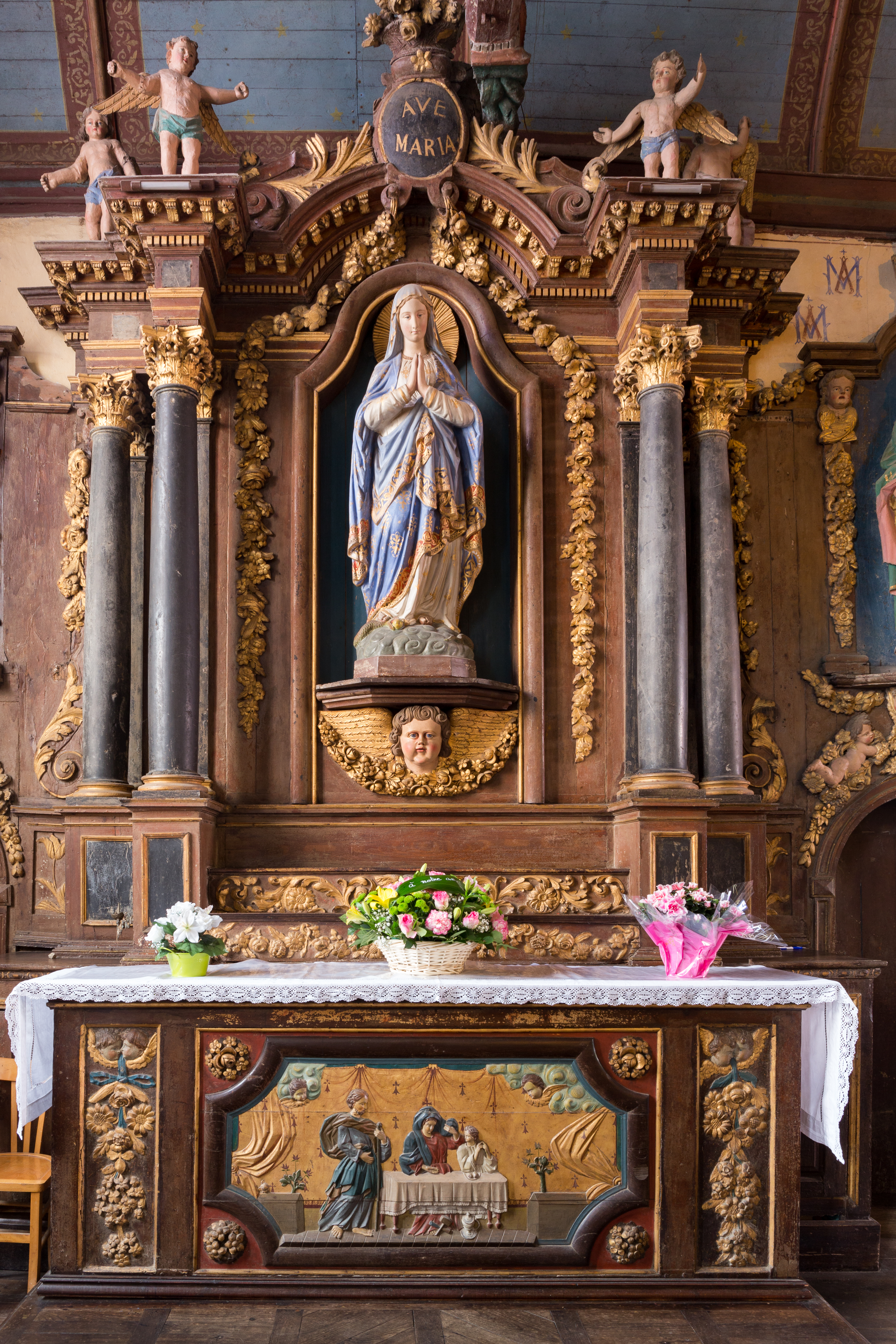 Iliz Sant-Pêr Pleiber-Krist: aoter Itron Varia.